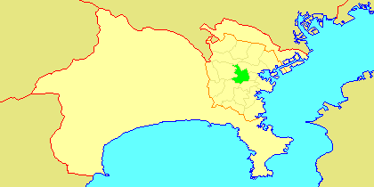 Map of Hodogaya-ku, Yokohama, Kanagawa-prefecture, Japan